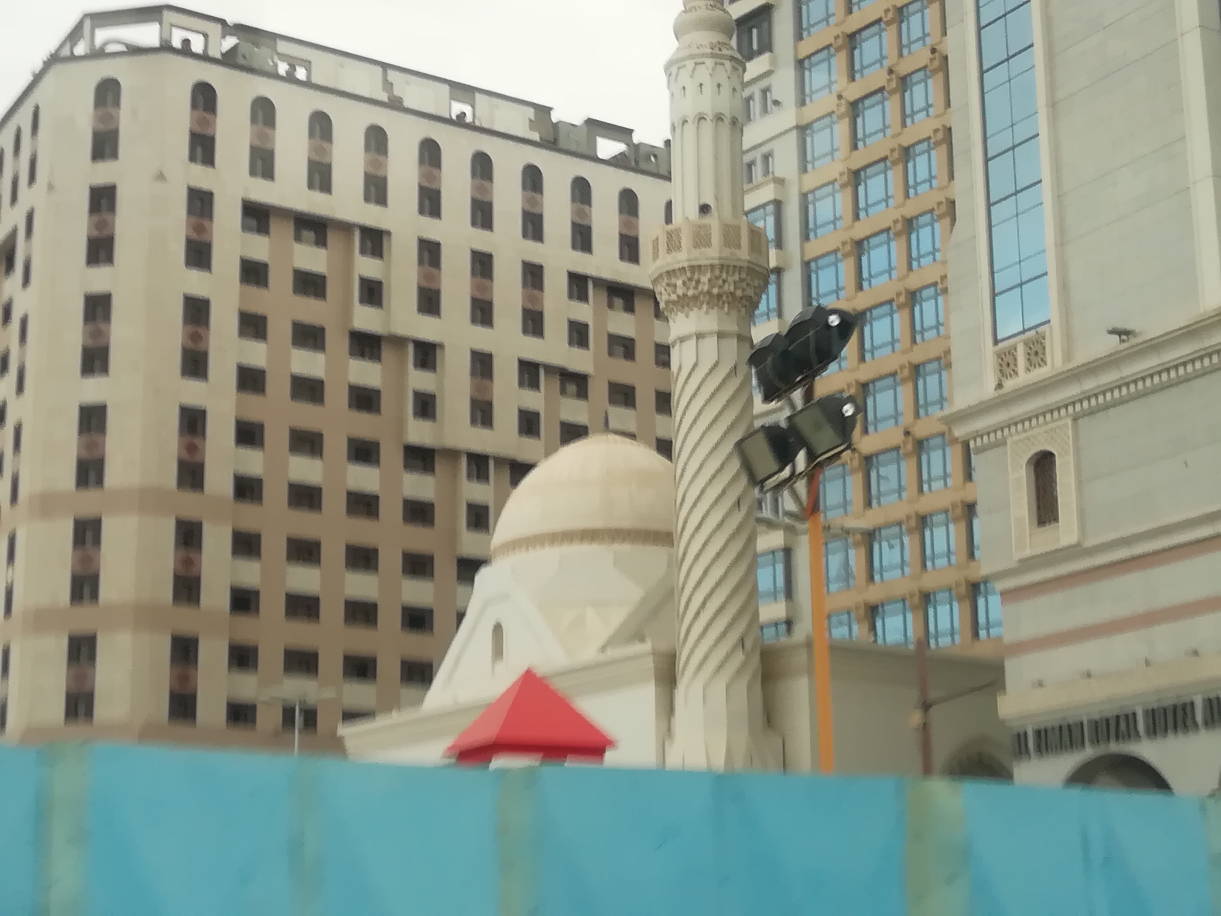 al-Madinah al-Munawarah Abu Dhar al-Ghafari street in Madina Abu Dhar al-Ghafari mosque? Bukhari mosque?